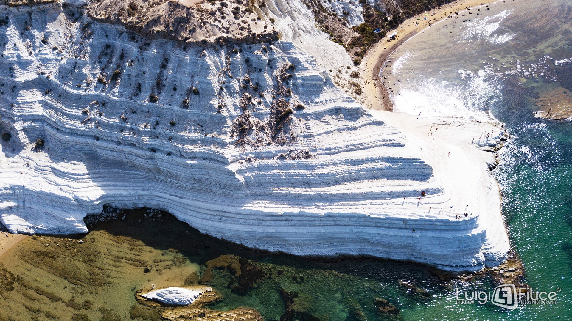 Scala dei Turchi Agrigento Sicilia